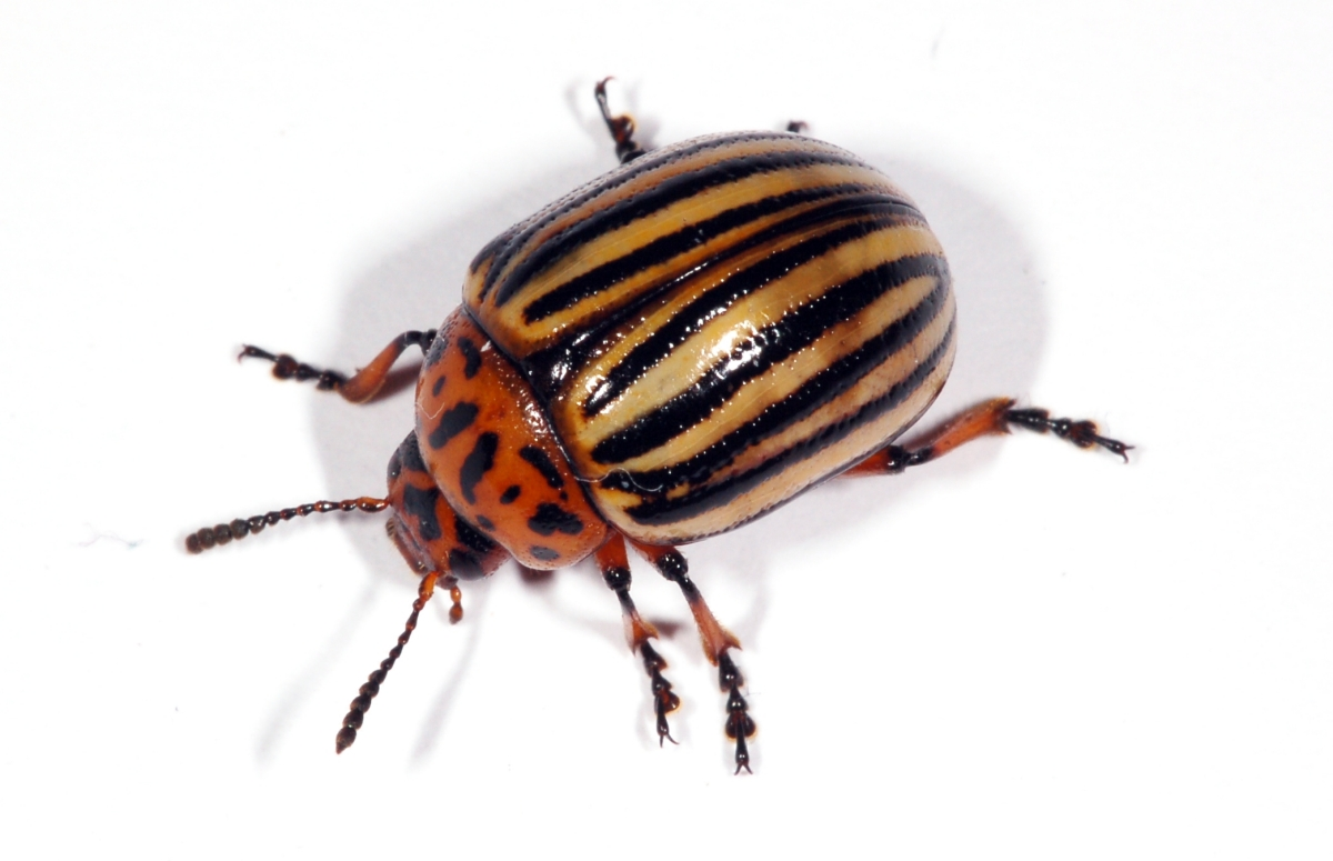 Leptinotarsa decemlineata, Selzerbrunnen, Frankfurt am Main, Hessen, Deutschland